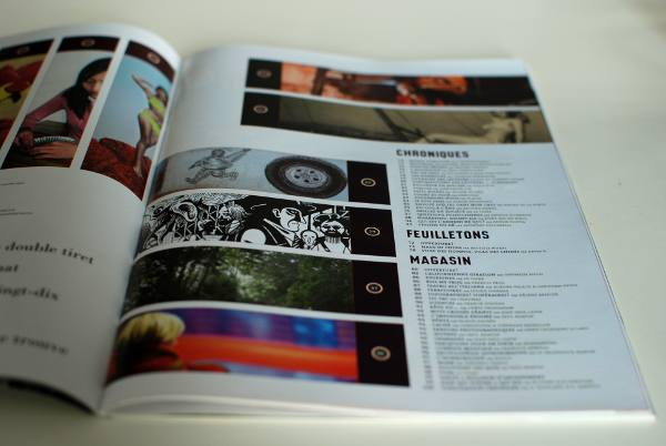 Photo 2 Journal Le Tigre